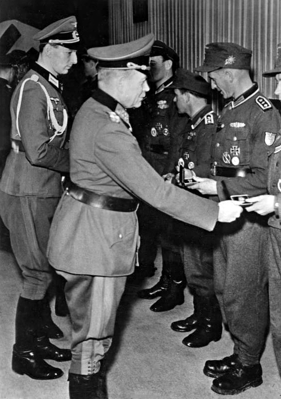 Guderian überreicht die Goldene Nahkampfspange Verleihung der goldenen Nahkampfspange Generaloberst Guderian überreicht im Auftrag des Führers den dreizehn verdienten Einzelnahkämpfern die goldene Nahkampfspange. PK-Aufnahme. Pospischill, Scherl 27.3.45 [Herausgabedatum] Abgebildete Personen: Guderian, Heinz: Generaloberst, Ritterkreuz (RK), Heer, Deutschland (GND 118543156)